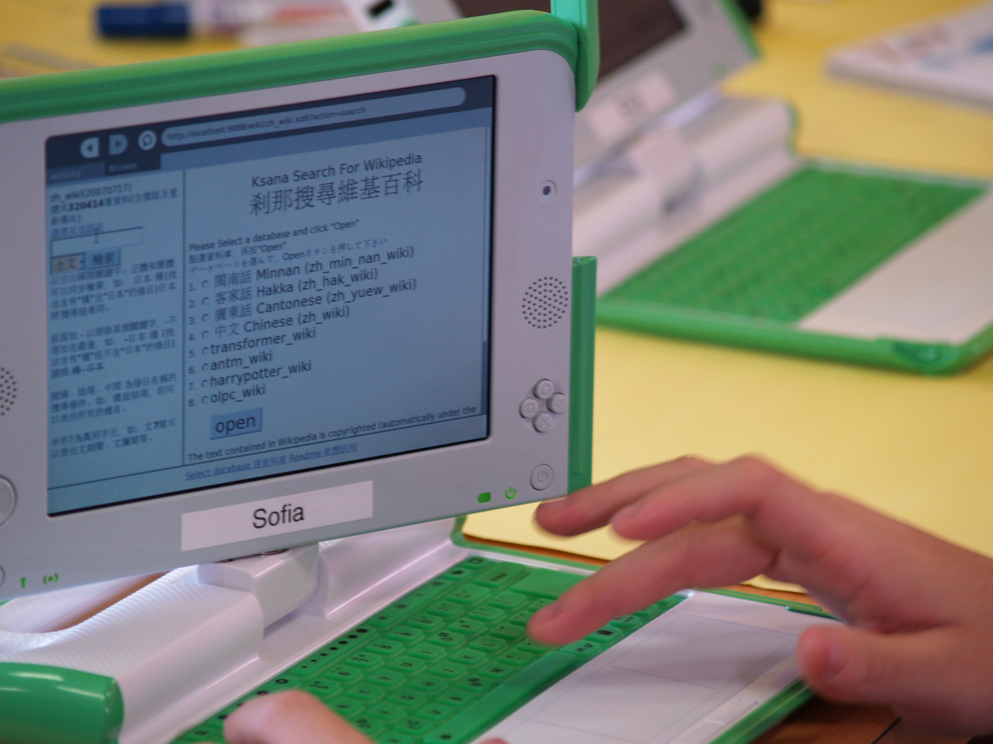 wikimania 2007